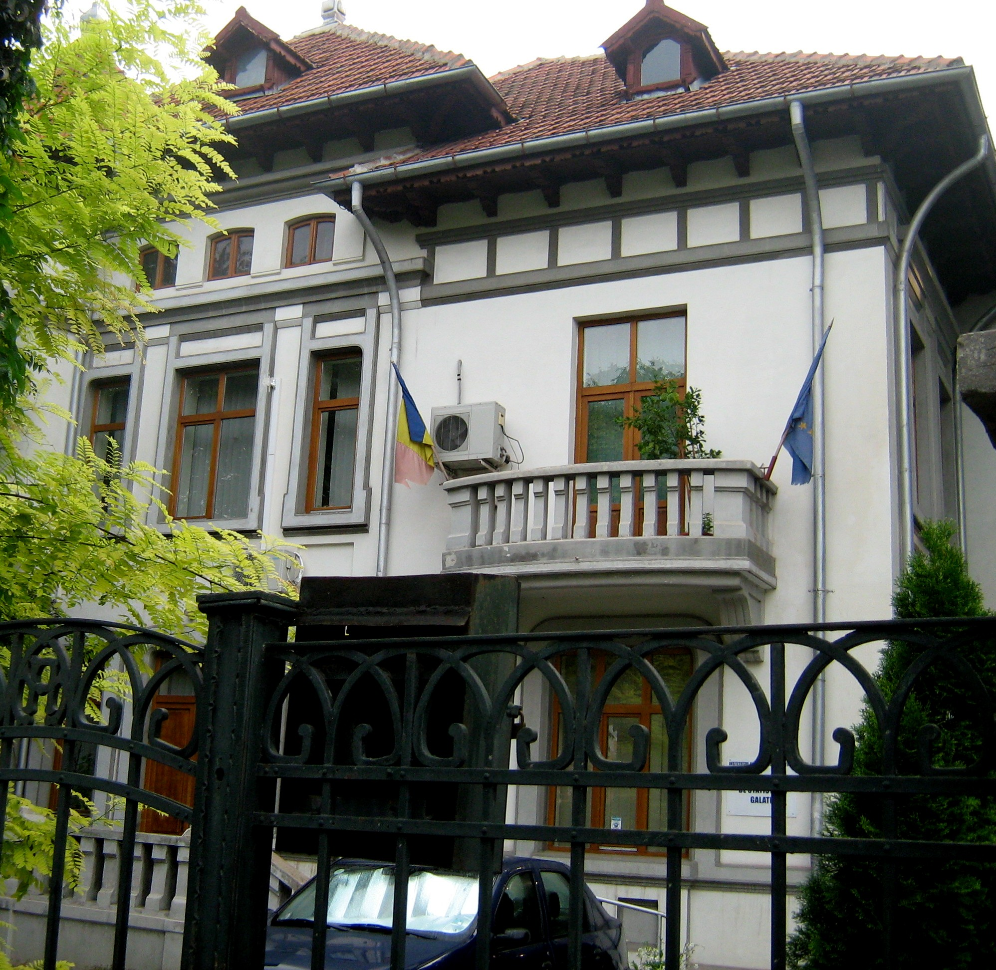 Directia Judeteana de Statistica